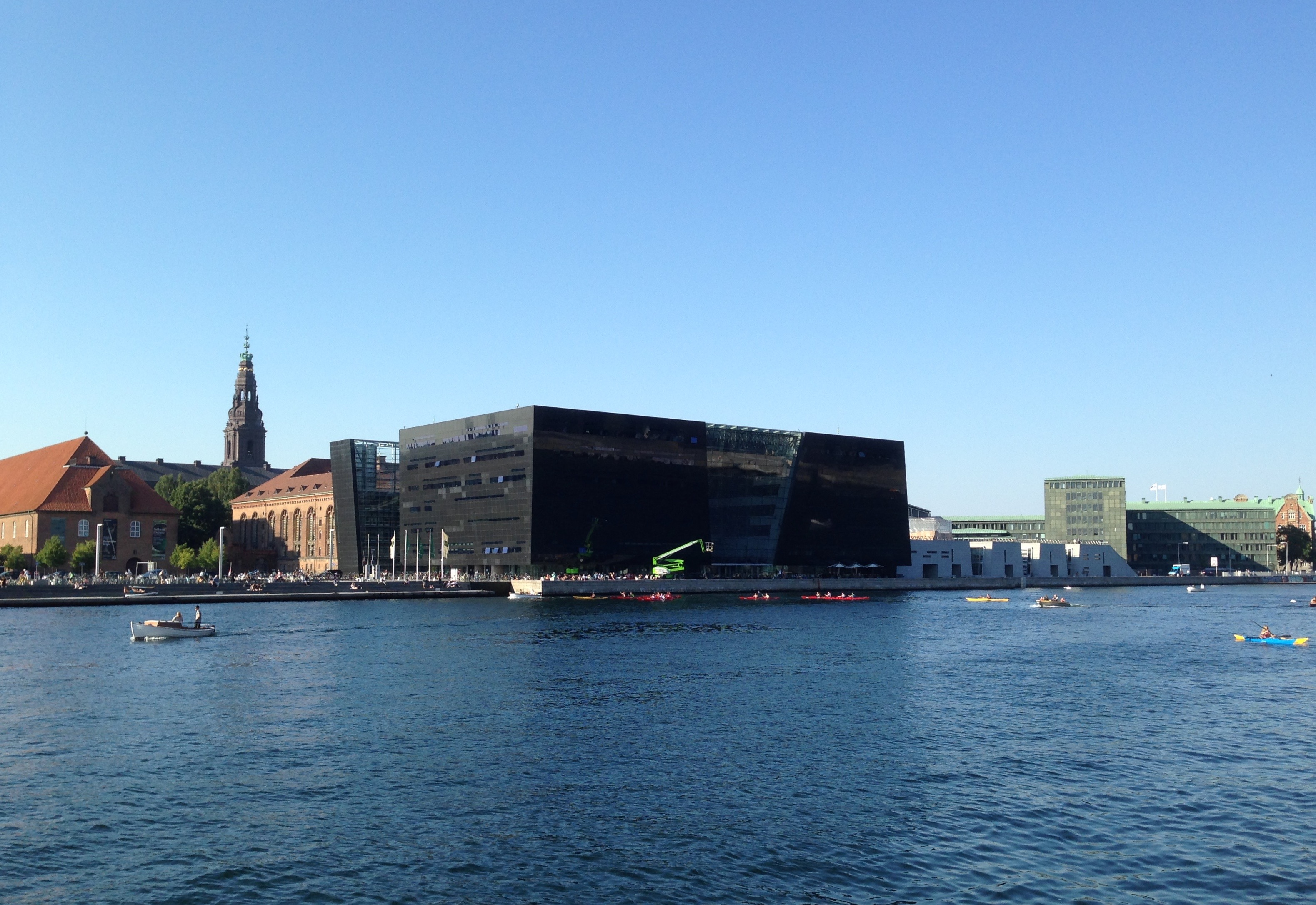 Christians Brygge in Copenhagen, Denmark